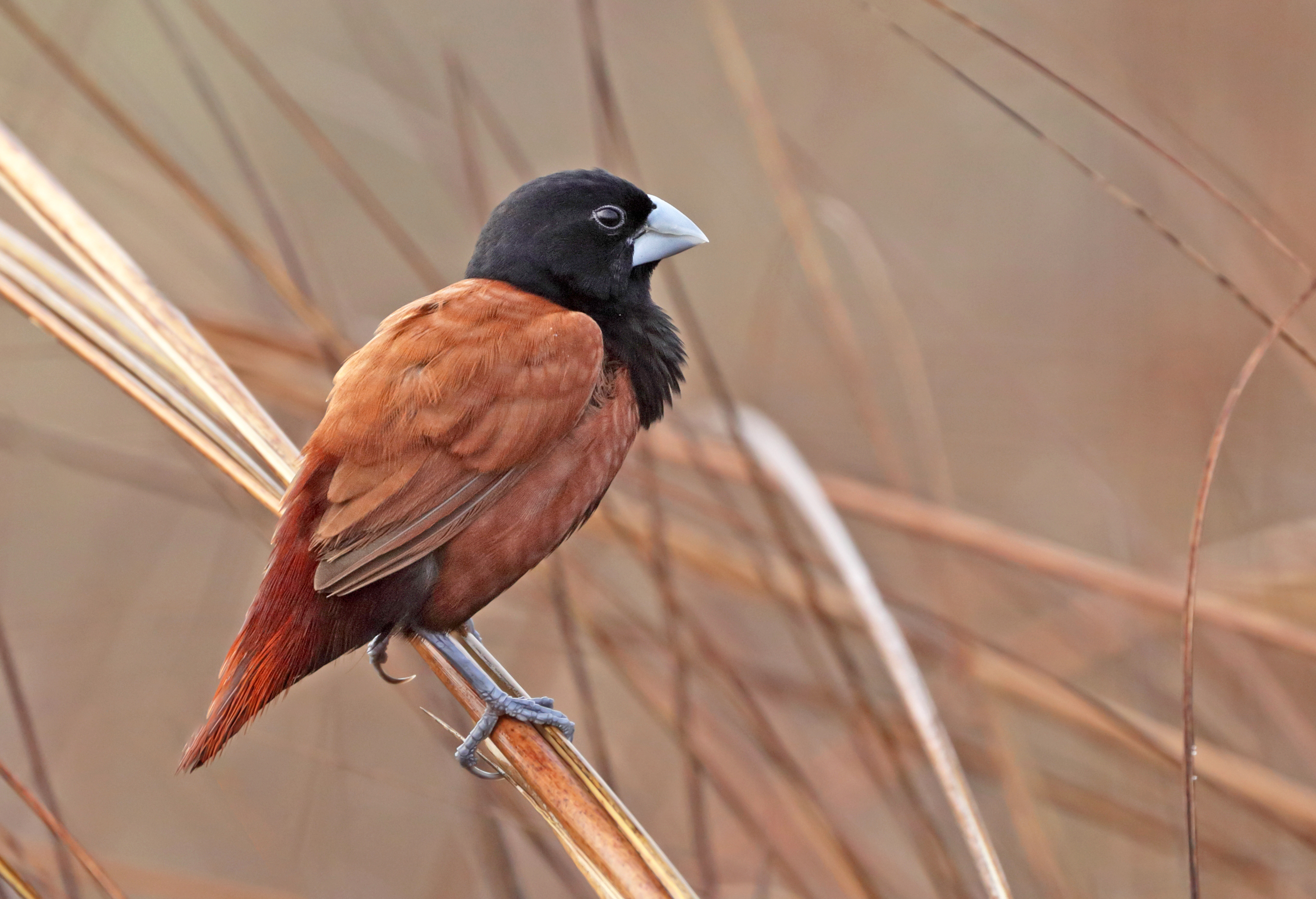 Chestnut munia